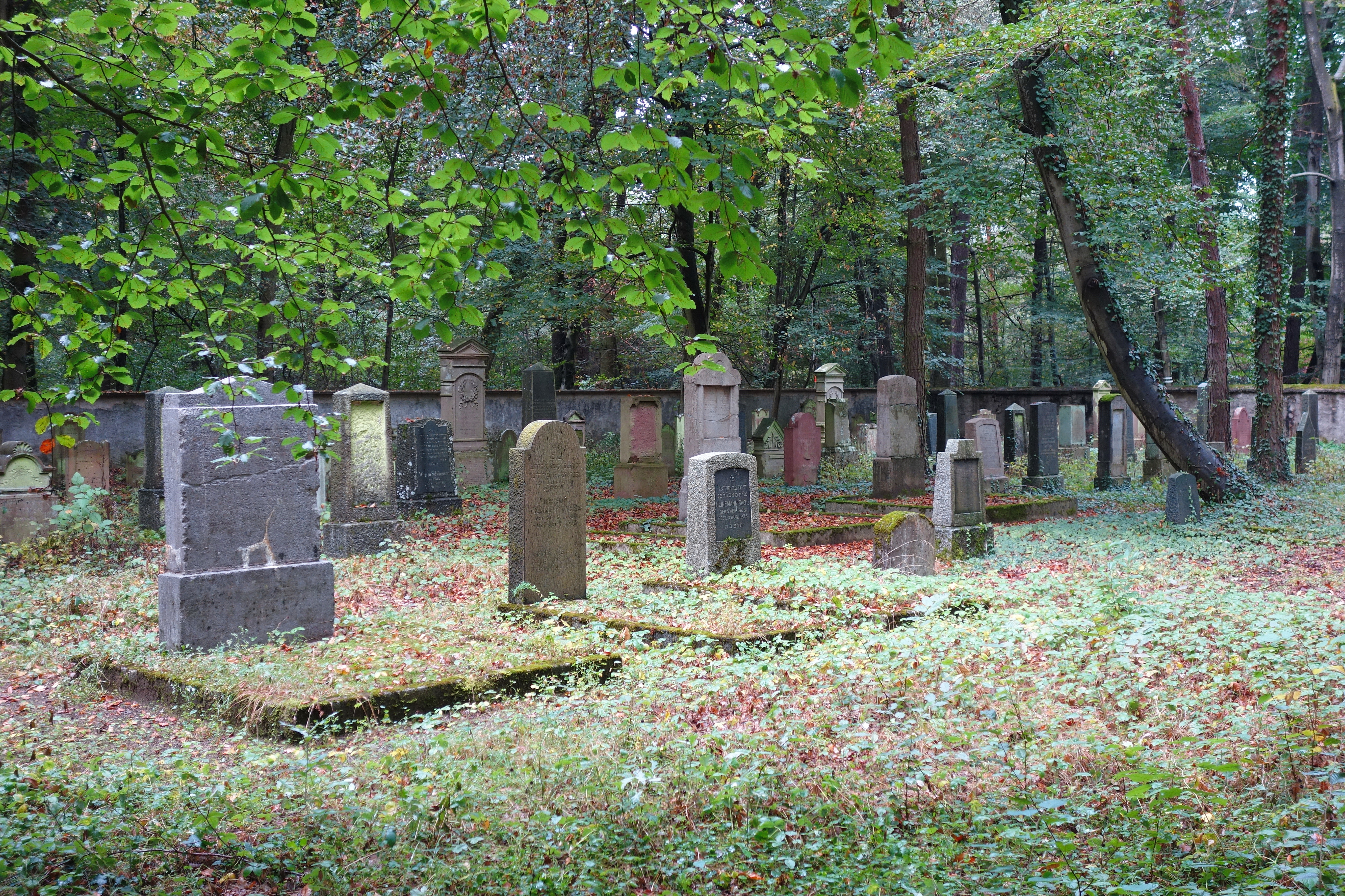 Heusenstamm Juedischer Friedhof